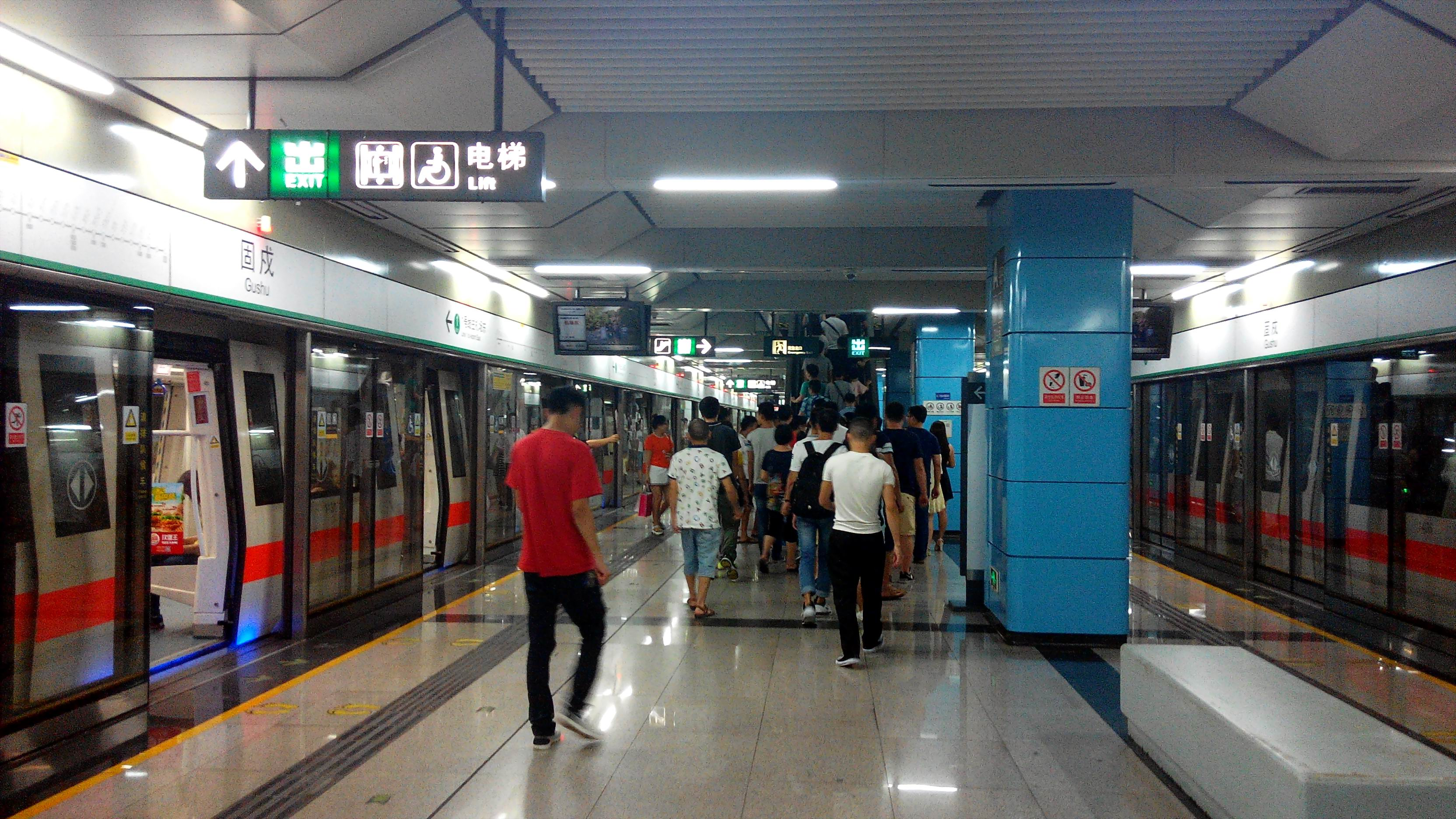 深圳地铁1号线 固戍站 1、2号站台